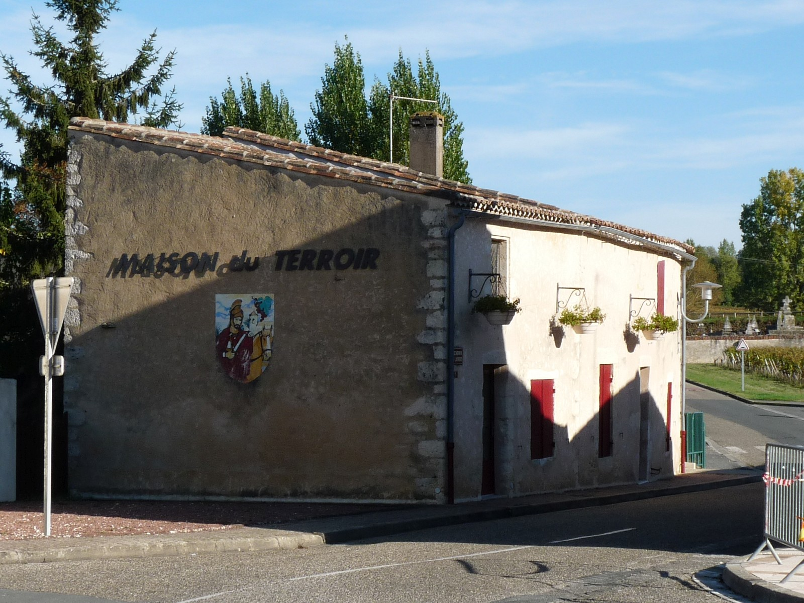 Maison du terroir, Saint-Martin-Lacaussade, Gironde, France